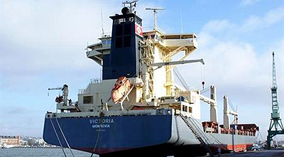 אניית המשא ויקטוריה בדגל ליבריה בנמל אשדוד, לאחר שנעצרה בלב ים כשהיא נושאית חימוש מאירן לחזבאלה ולחמאס